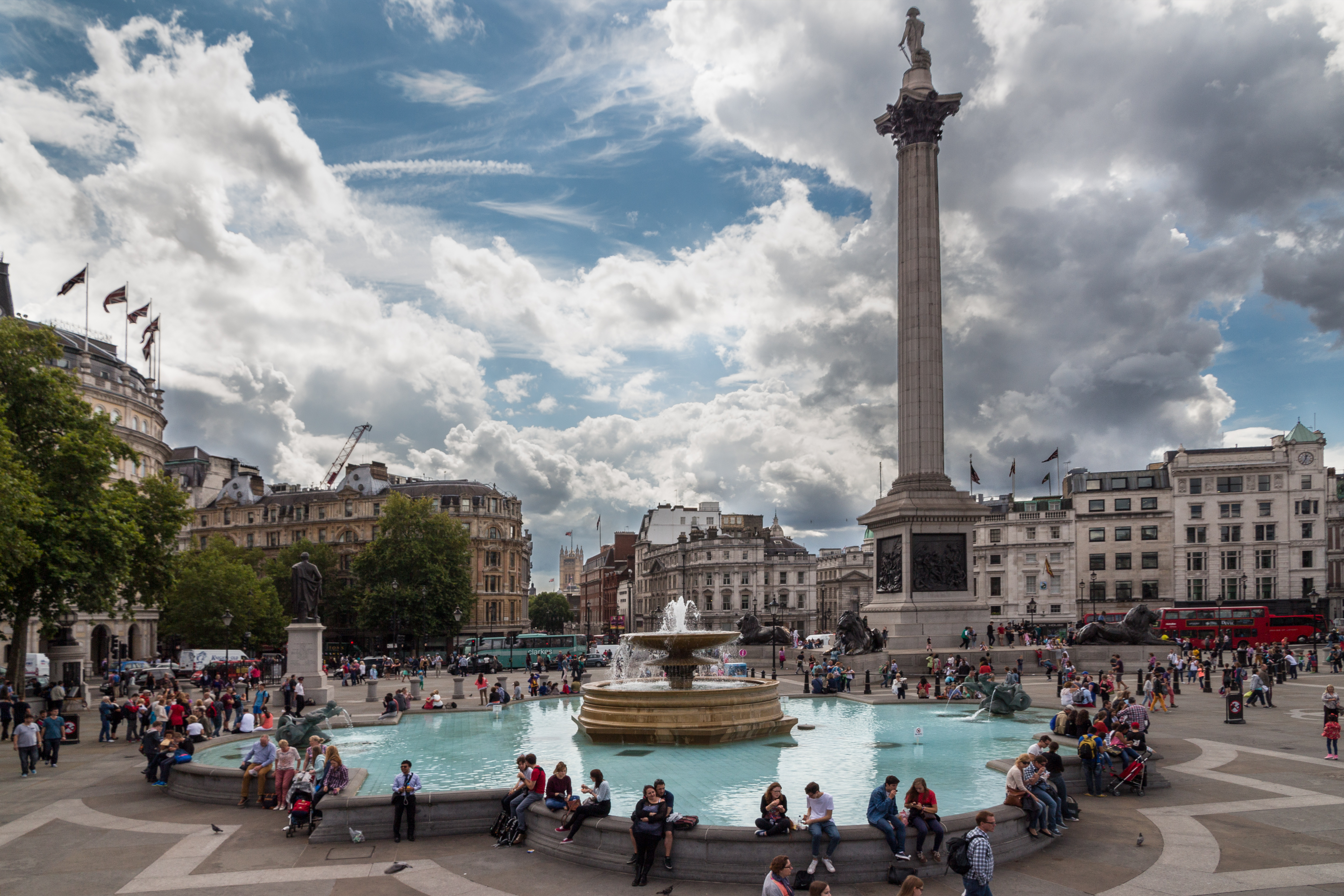 Und das letzte Urlaubsbild für die nächste Zeit